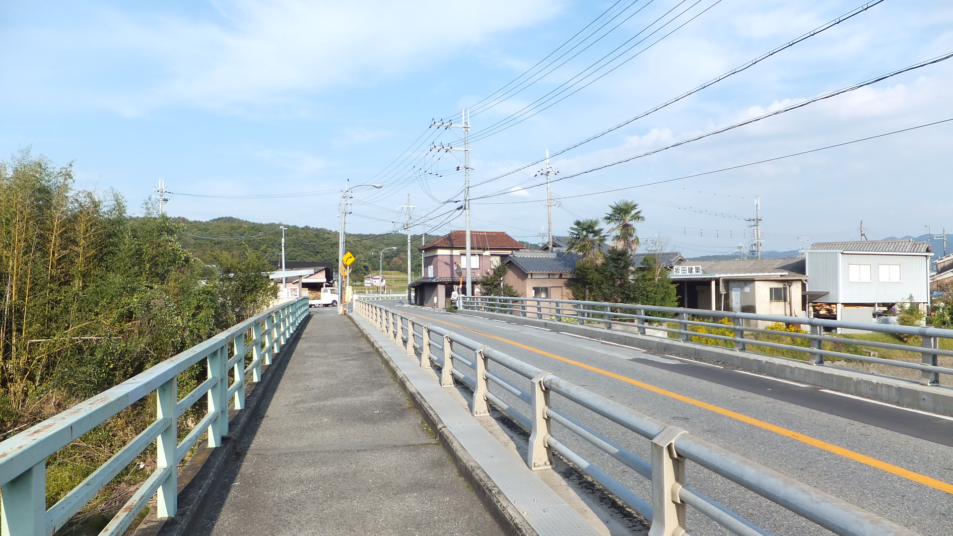 兵庫県三木市志染町安福田 兵庫県道38号三木三田線 長早橋